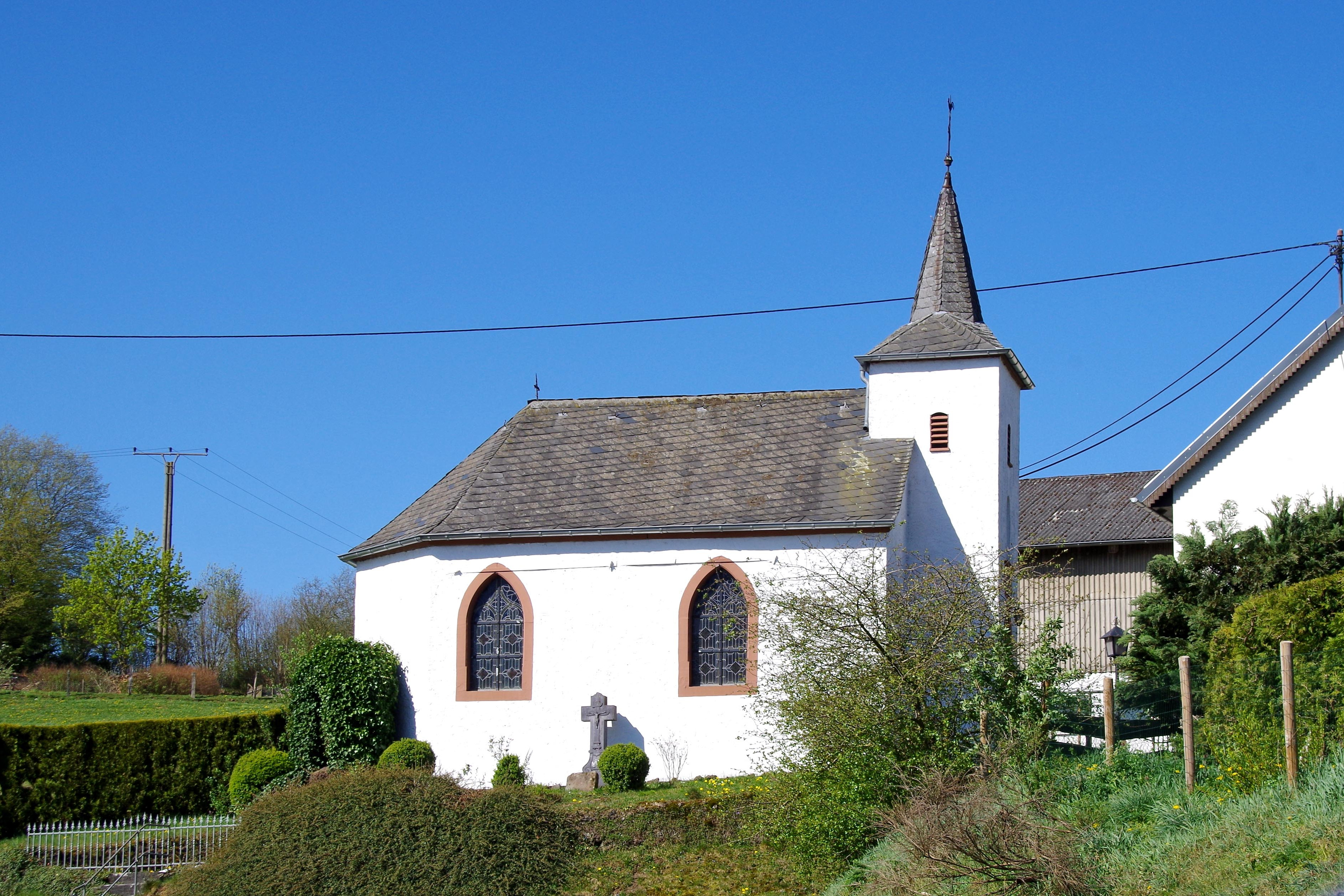 St. Peter und St. Margarethe (Laudesfeld), Ostseite